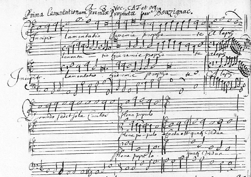 Beginning of Guillaume Bouzignac's Prima Lamentatione Jeremiae, from Paris BNF Mus.) : RES VMA MS 571 (recueil Deslauriers).